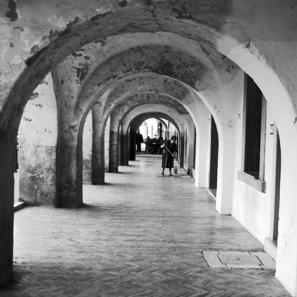 Portici Venosa - Piazza Castello